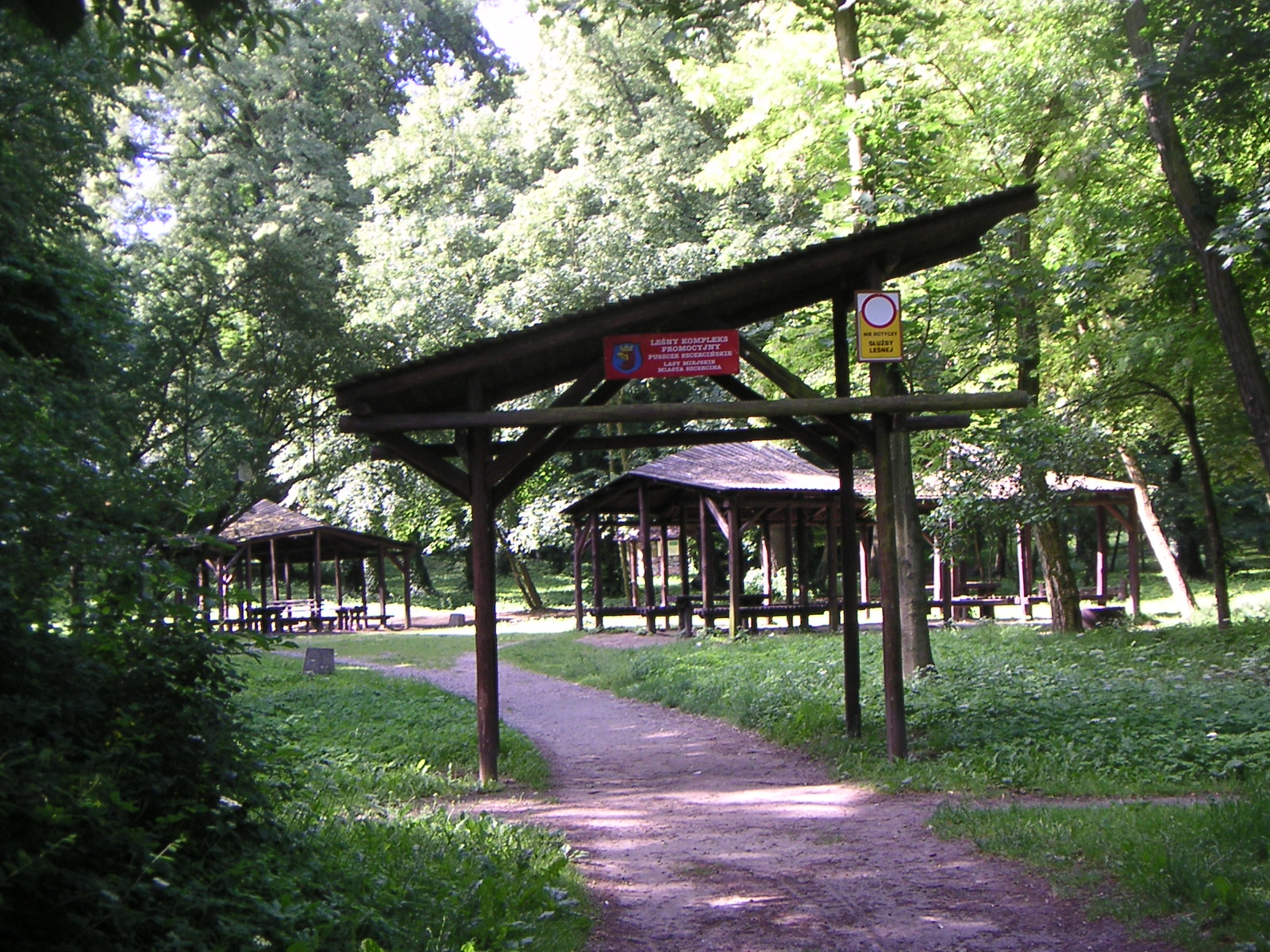 Szczecin-Bukowe-Klęskowo, Park Leśny Klęskowo, wejście od strony północnej, z ul. Pszennej